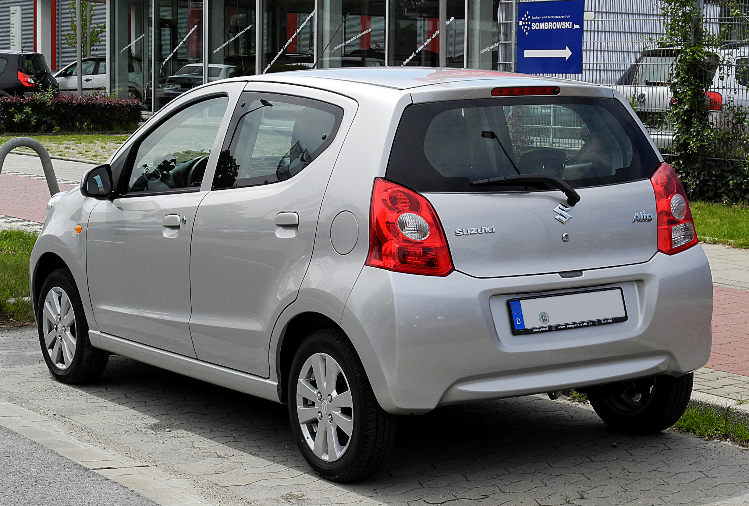 Suzuki Alto 1.0 Comfort (VII)